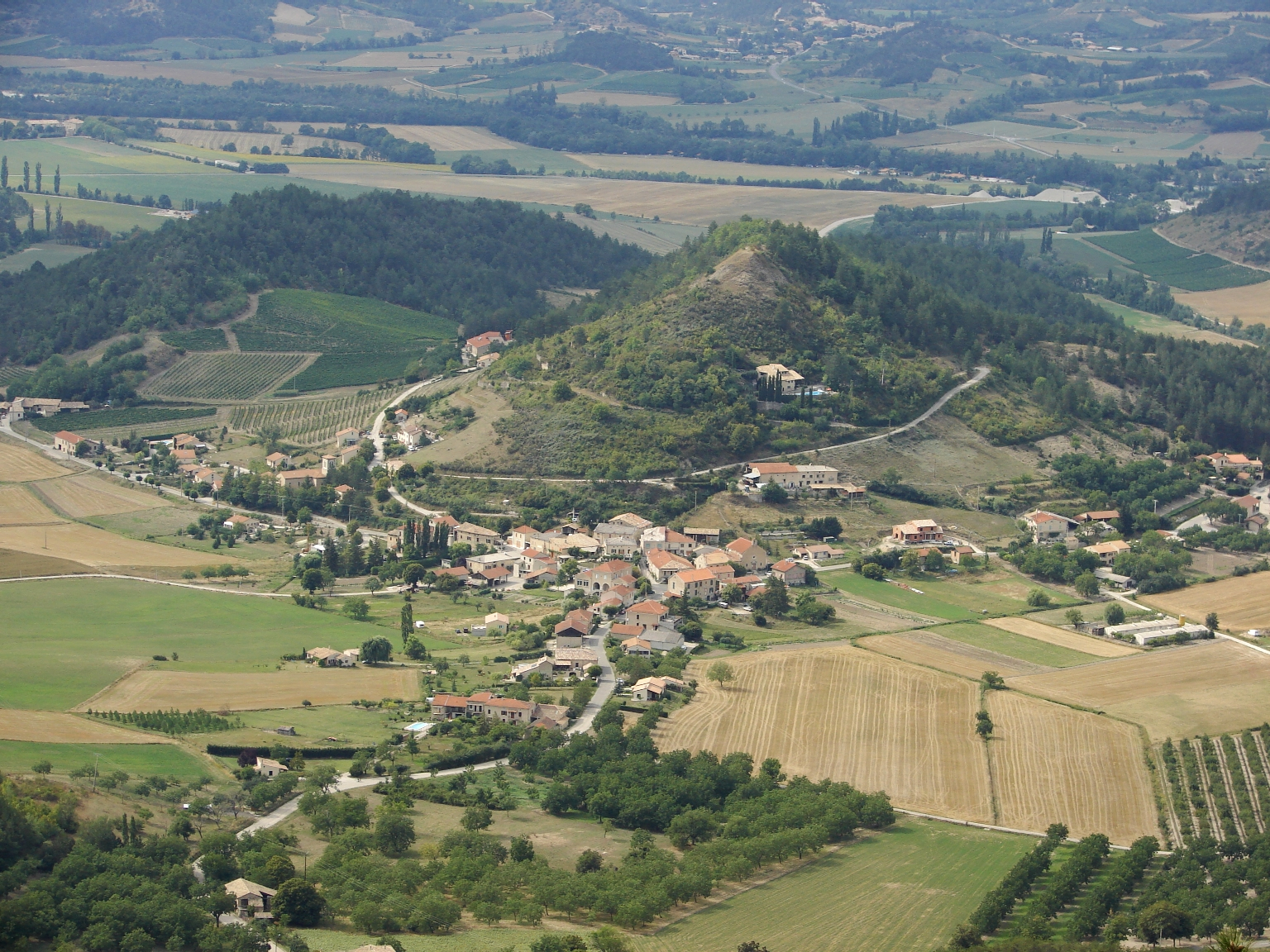 photo prise en aout 2006, dont je suis l'auteur